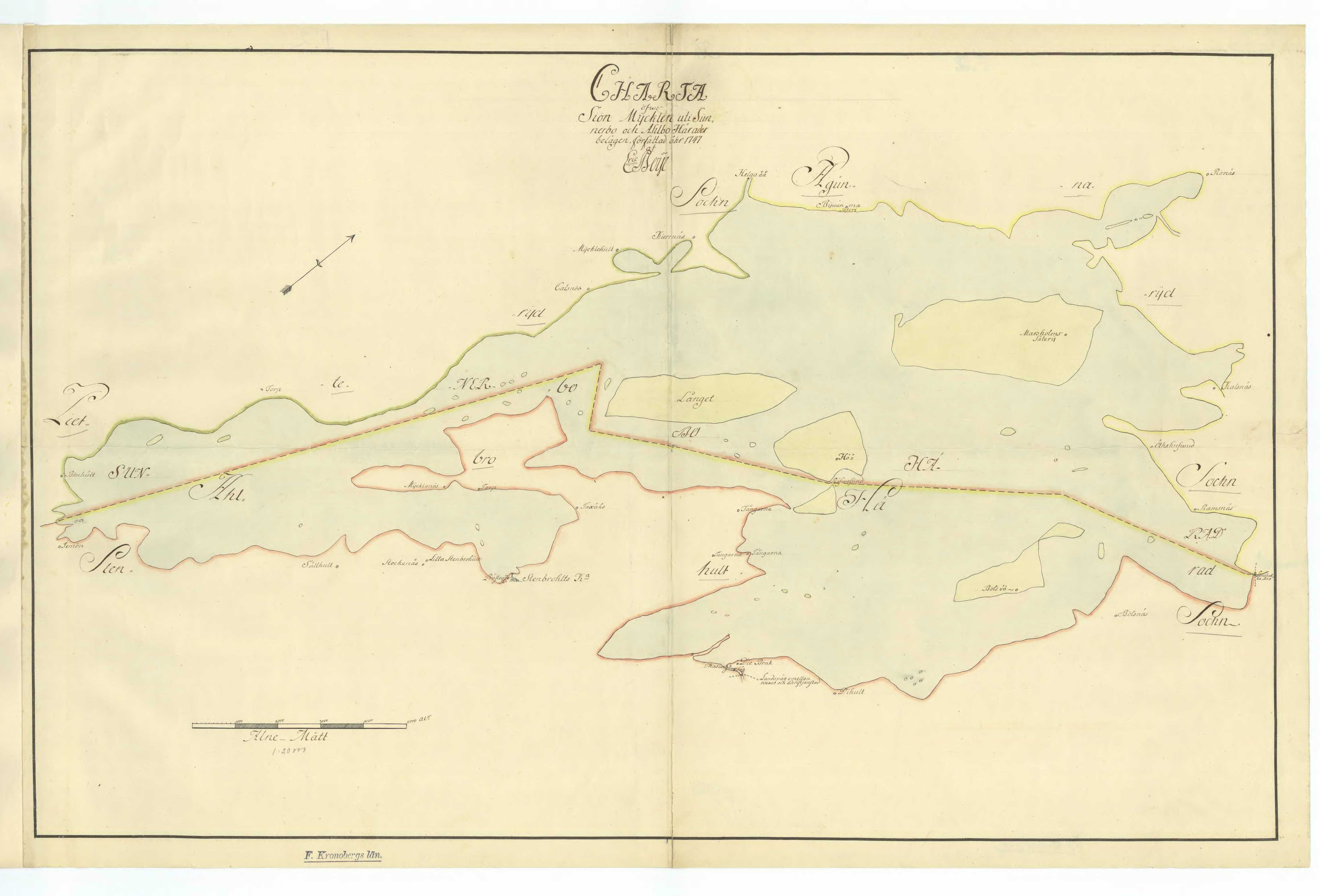 Äldre karta över sjön Möckeln i södra Småland.